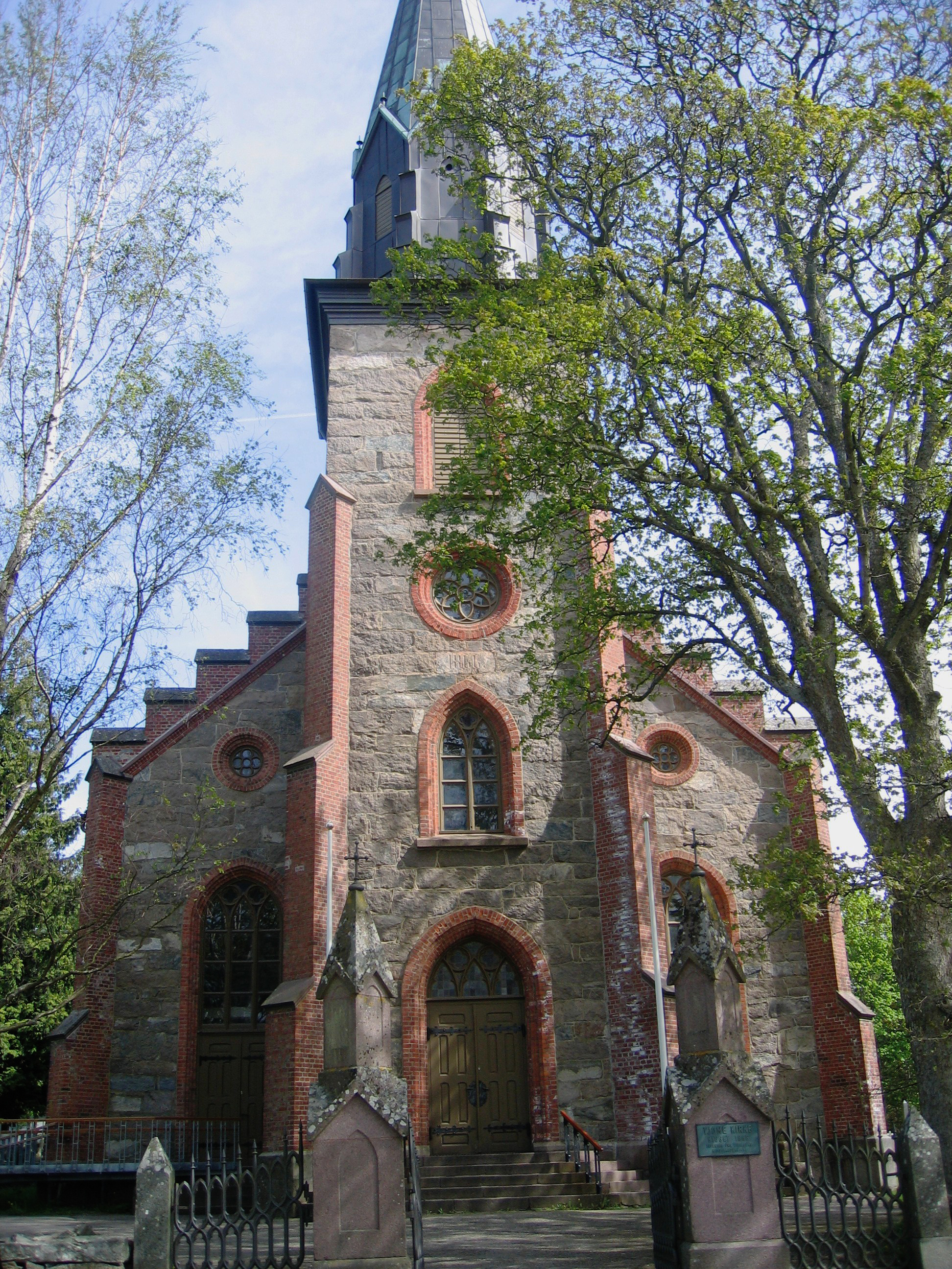 Tjøme kirke, sett fra vest.